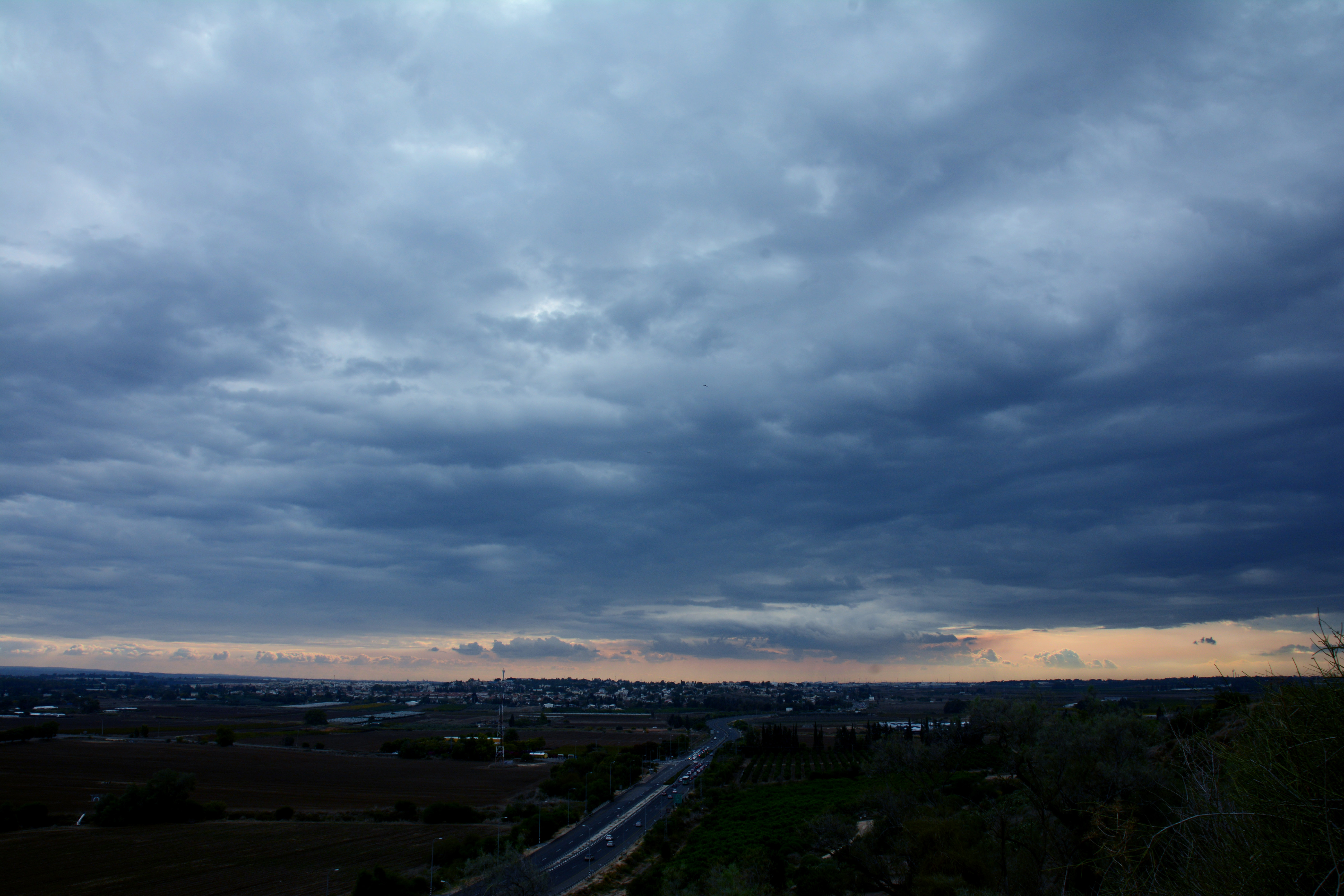 ענני גשם